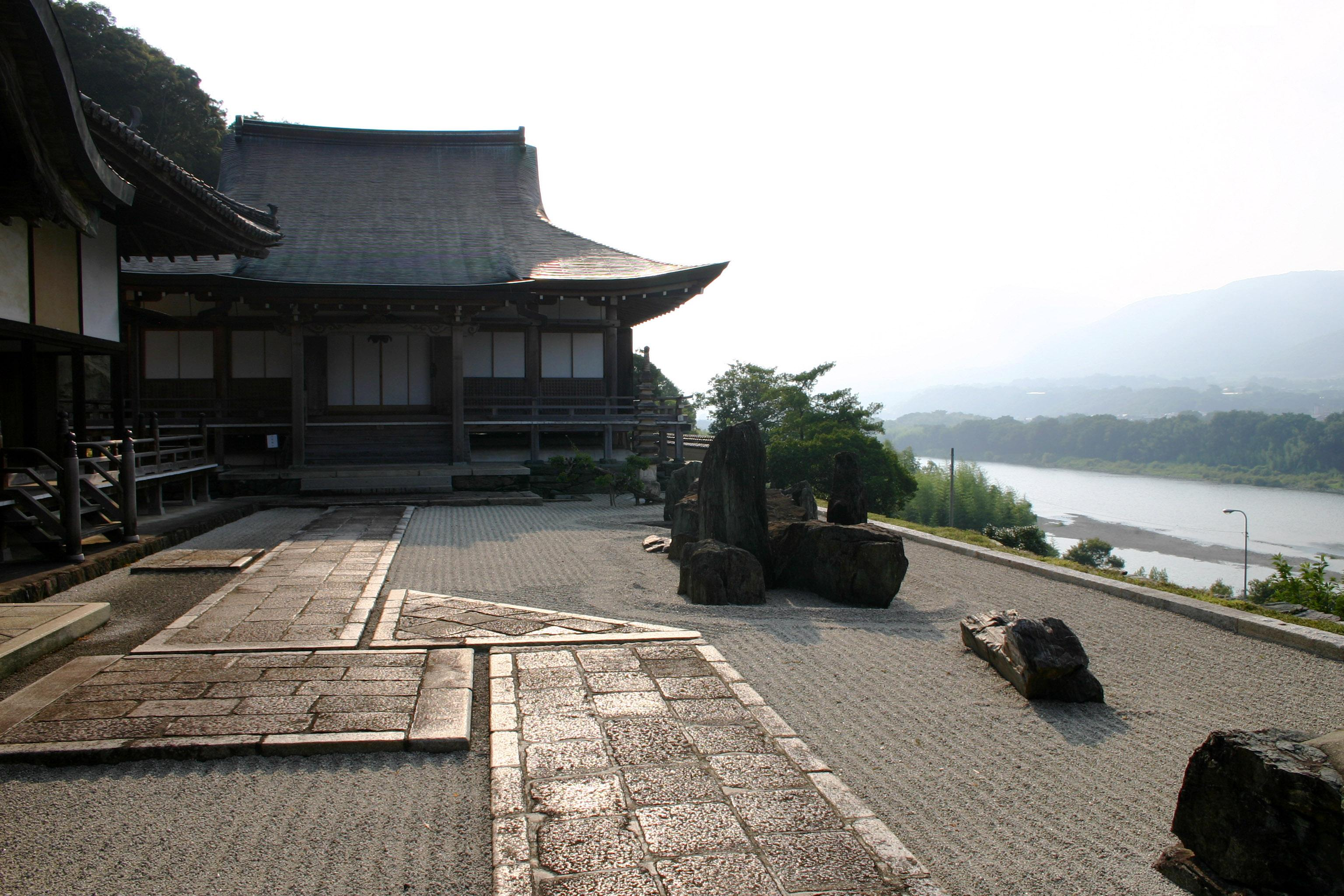 HonRaku-ji in Mima-shi, Tokushima-ken, Japan